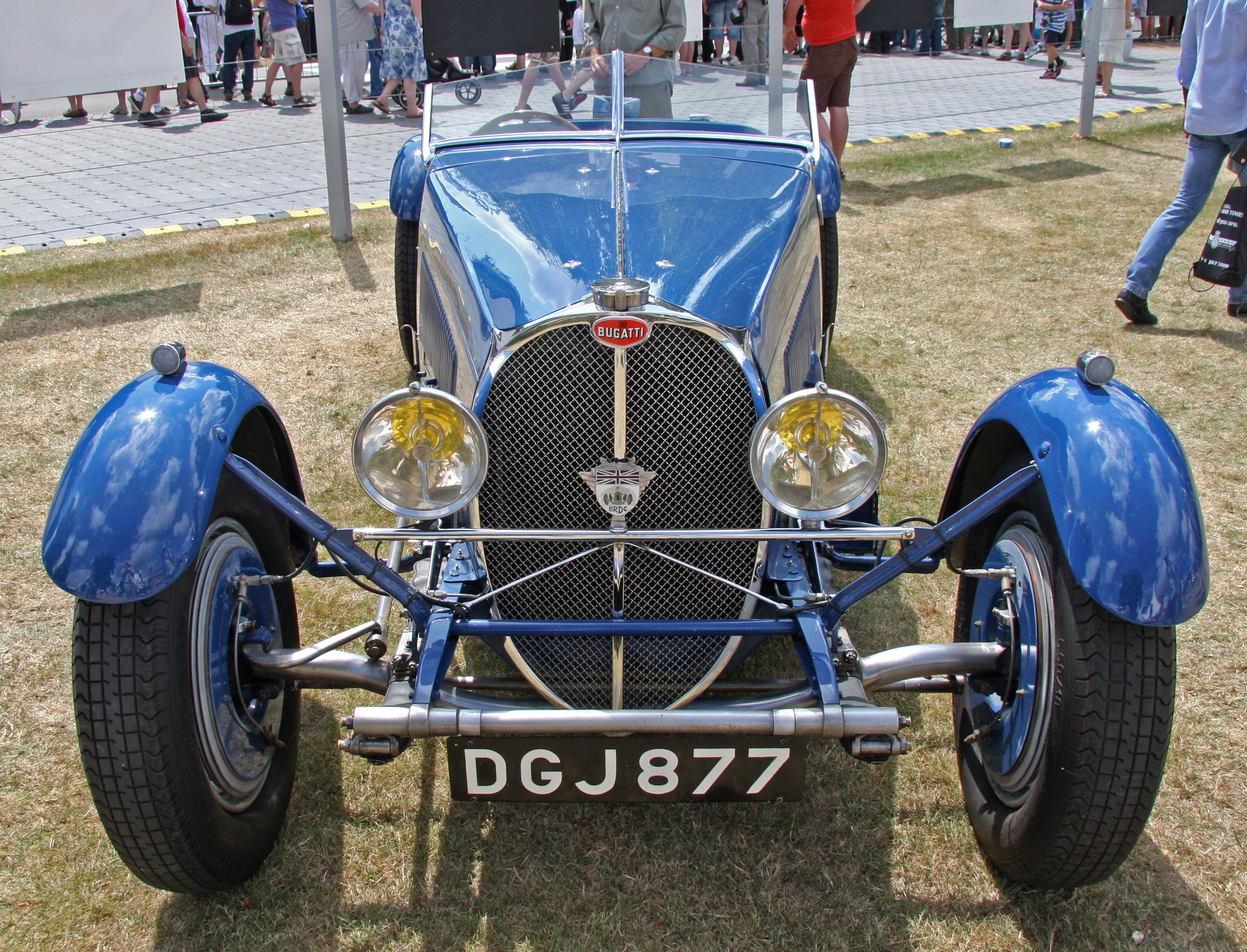 1936 Bugatti Type 57S Roadster